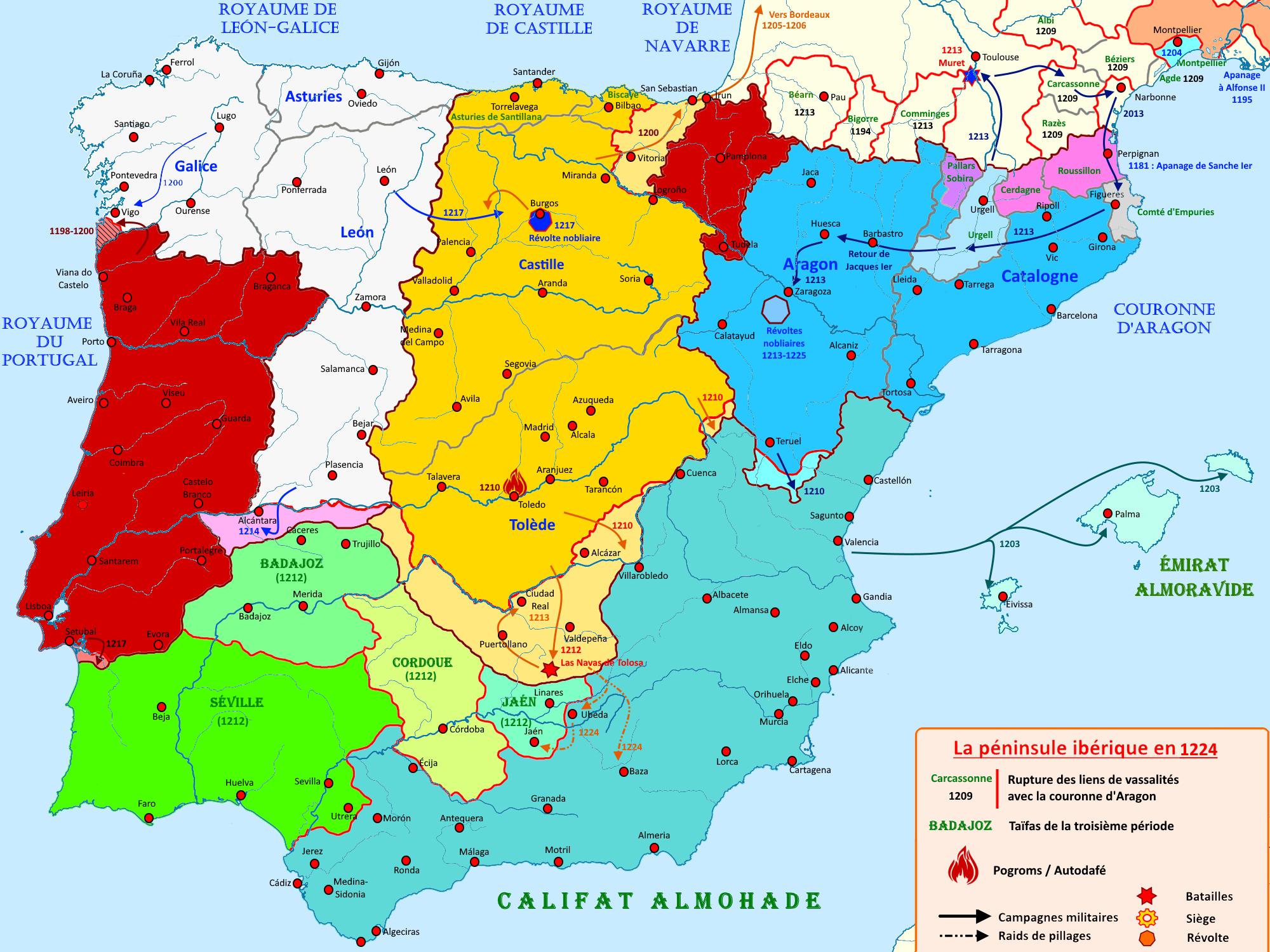 Carte de la péninsule ibérique en 1224 illustrant les principaux évènements de l'époque